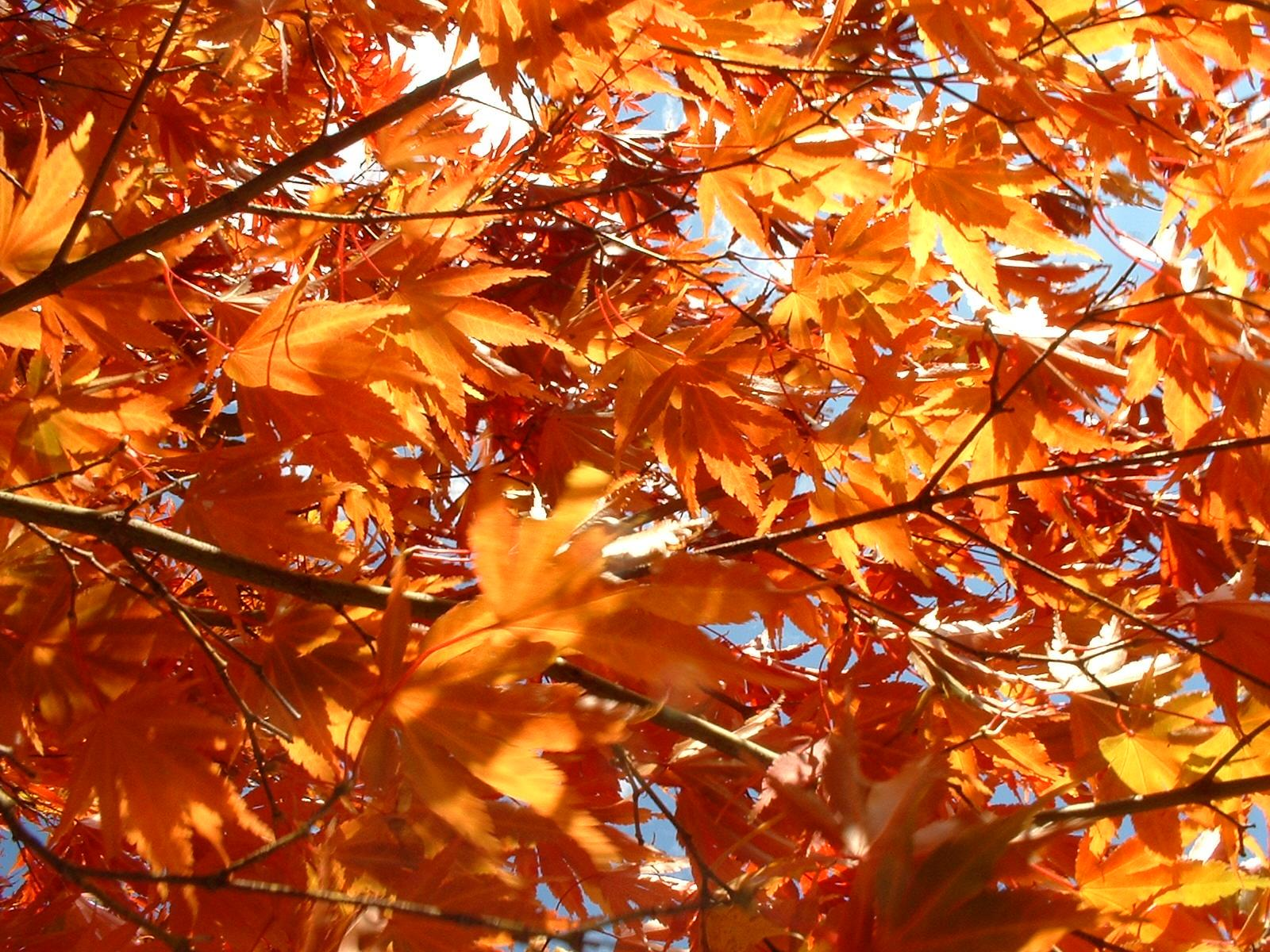 Autumn leaves